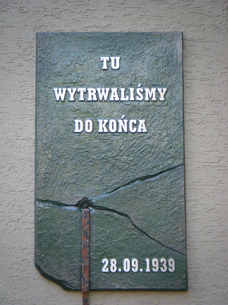 Miejsce upamiętniające barykadę z okresu obrony Warszawy we wrześniu 1939 roku. Ulica Francuska, w pobliżu skrzyżowania z ul. Zwycięzców.